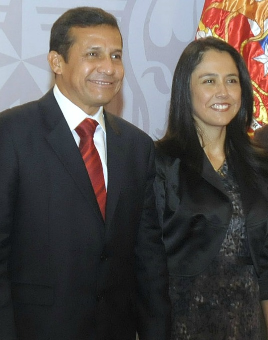 15.06.2011 Ollanta Humala y su esposa Nadine Heredia